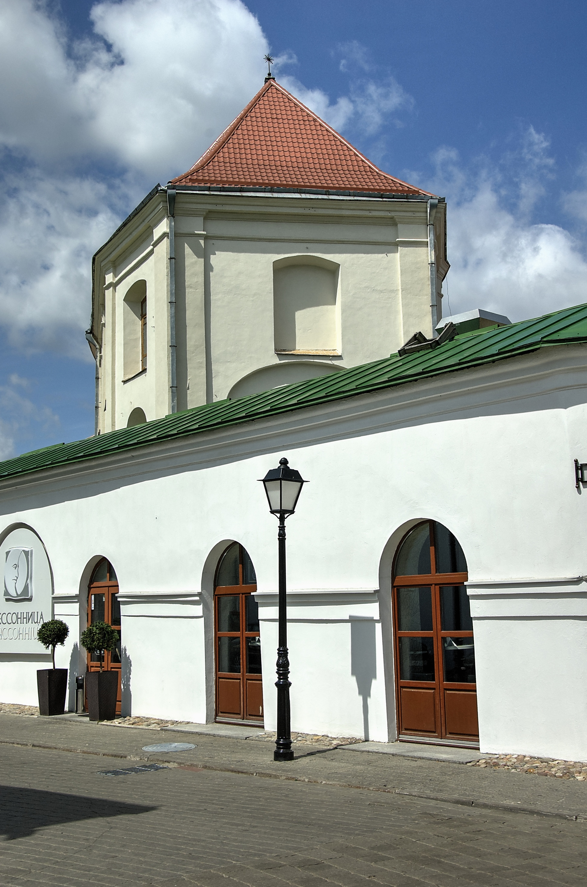 Беларуская (тарашкевіца): Касьцёл Сьвятога Язэпа, Менск